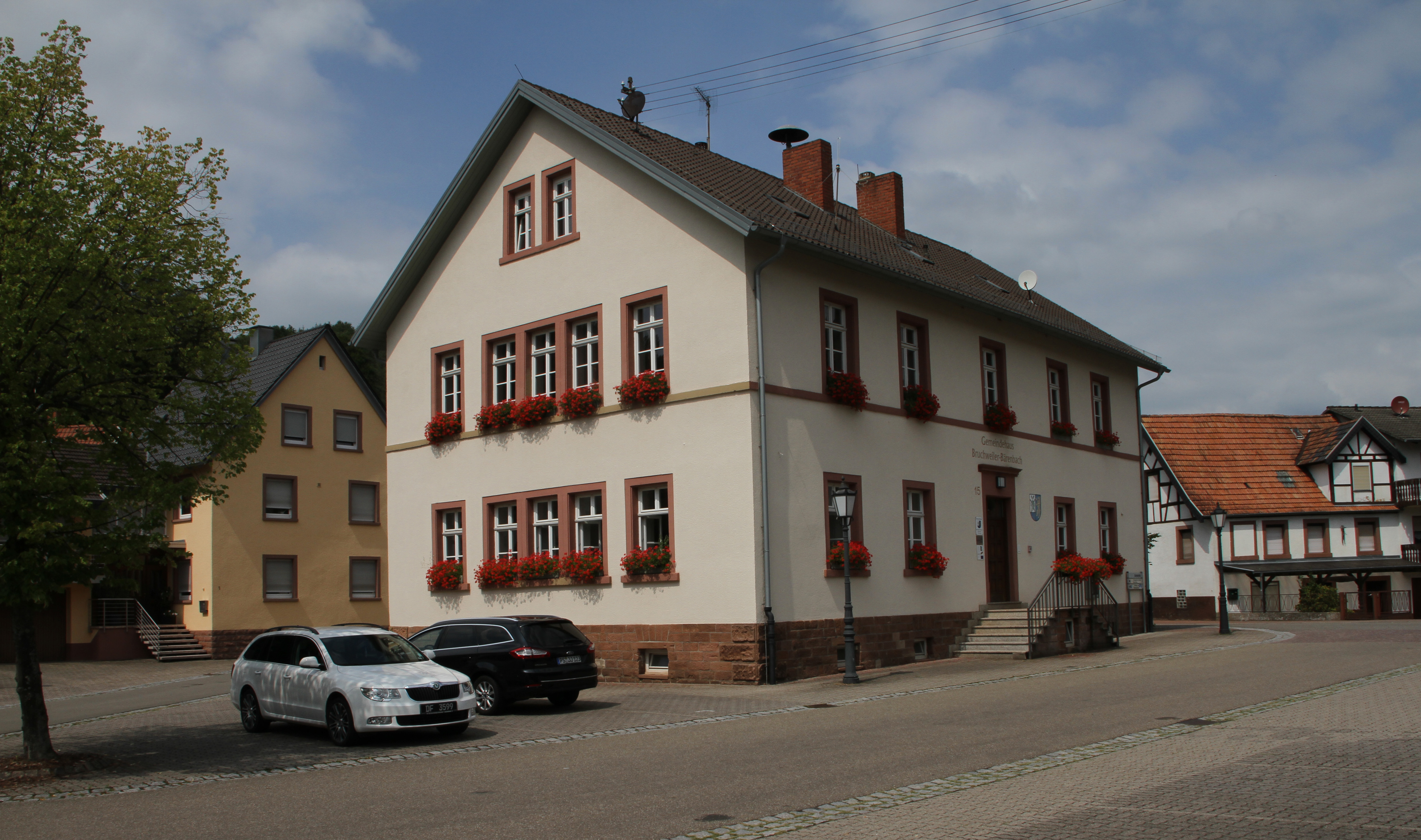 Bruchweiler-Bärenbach, Gemeindehaus.